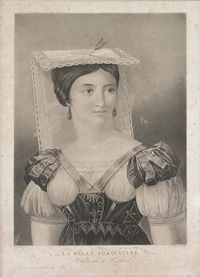 "La Belle Frascatane" by Philibert-Louis Debucourt (1755-1832) after Raphael (Raffaello Sanzio). Aquatint.